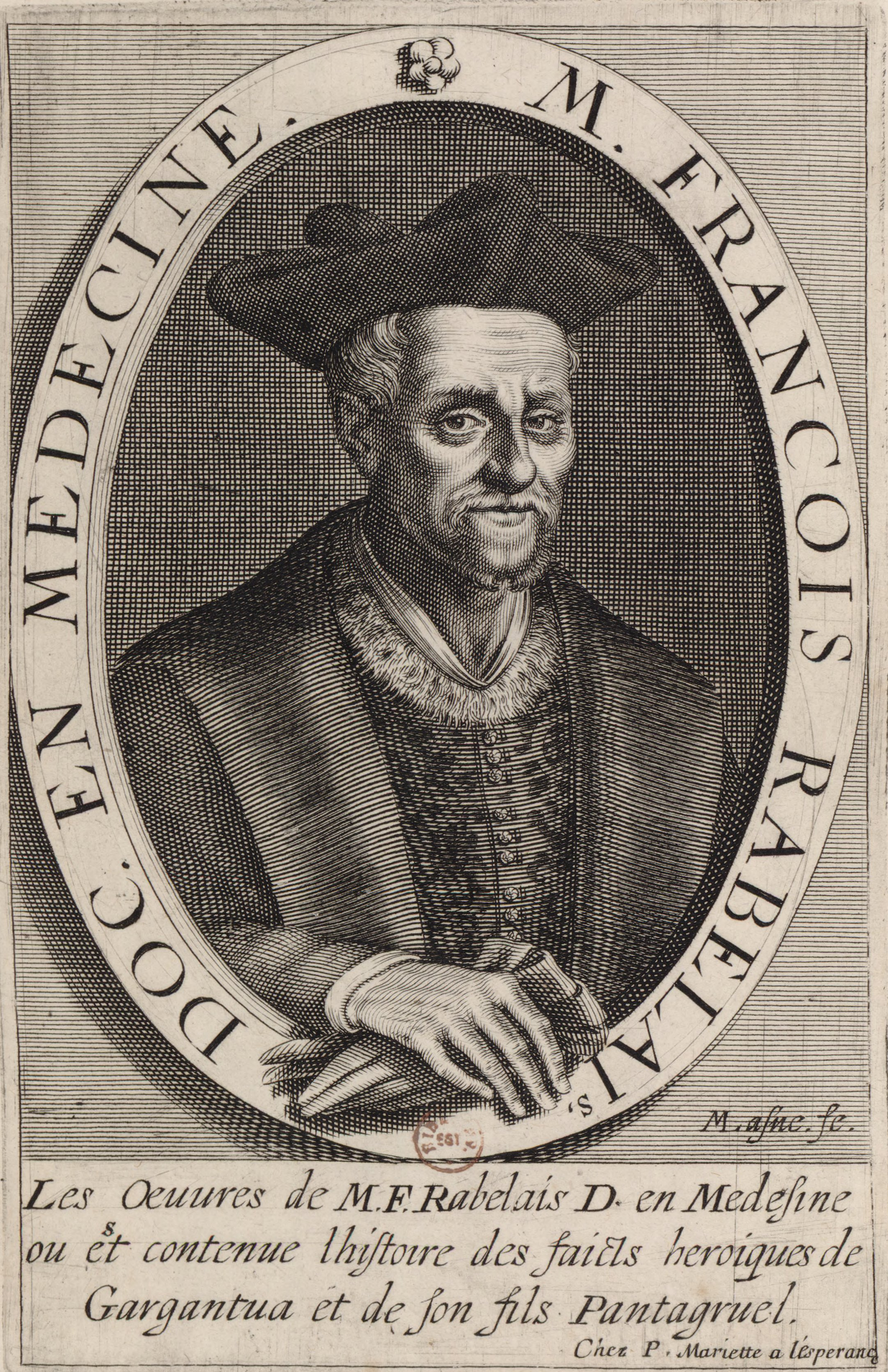 Portrait de Rabelais